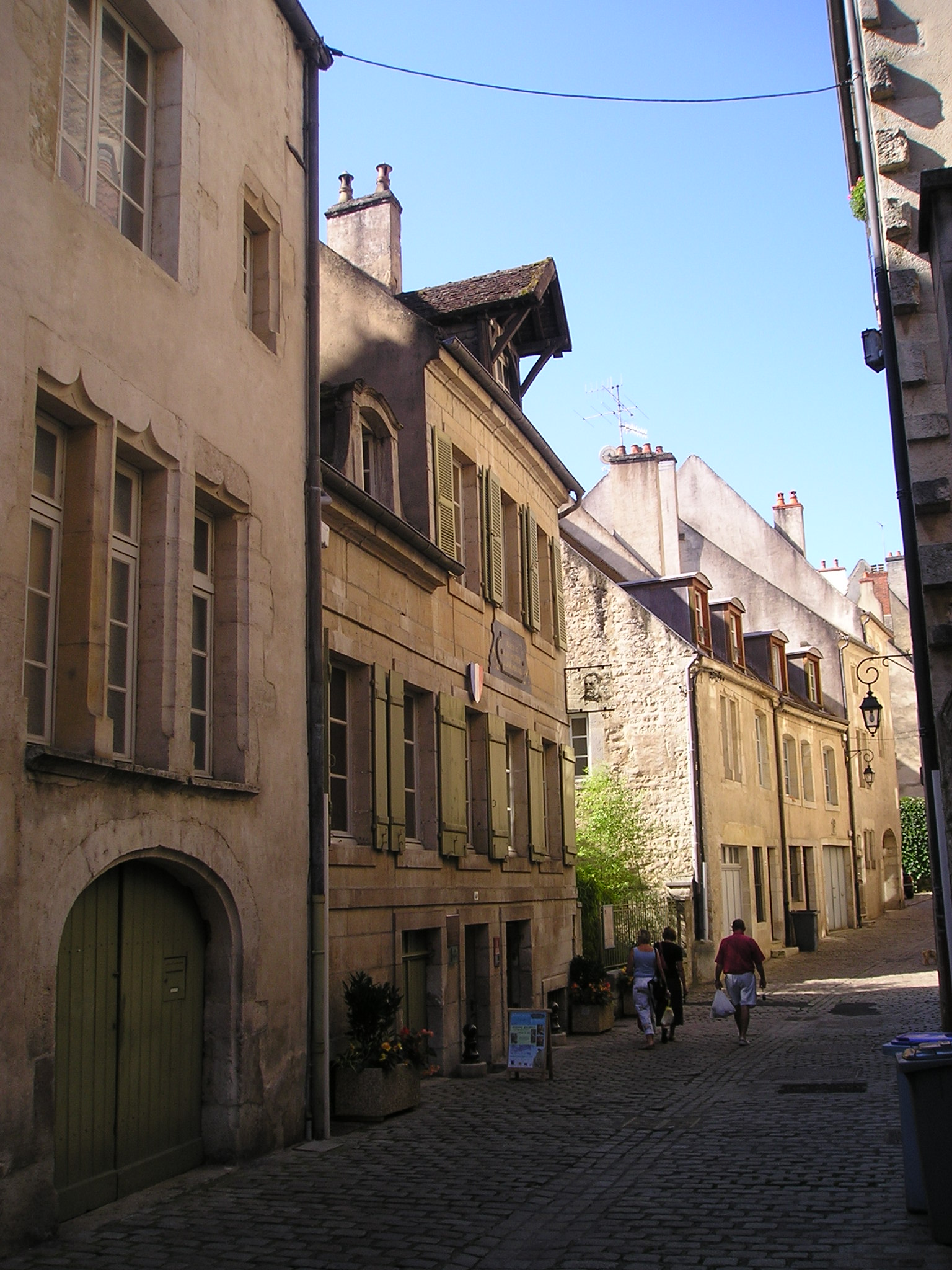 Geburtshaus von Louis Pasteur in Dole